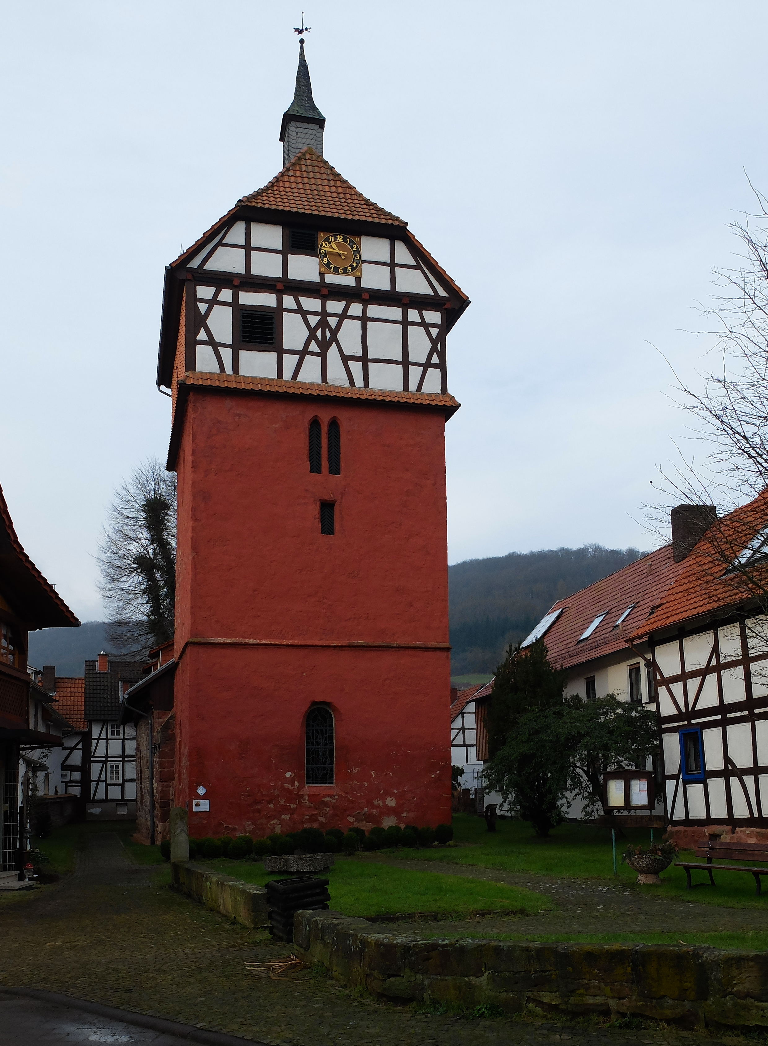 St. Martinskirche, Fuhrgraben 2, Hoheneiche (Wehretal) Hessen